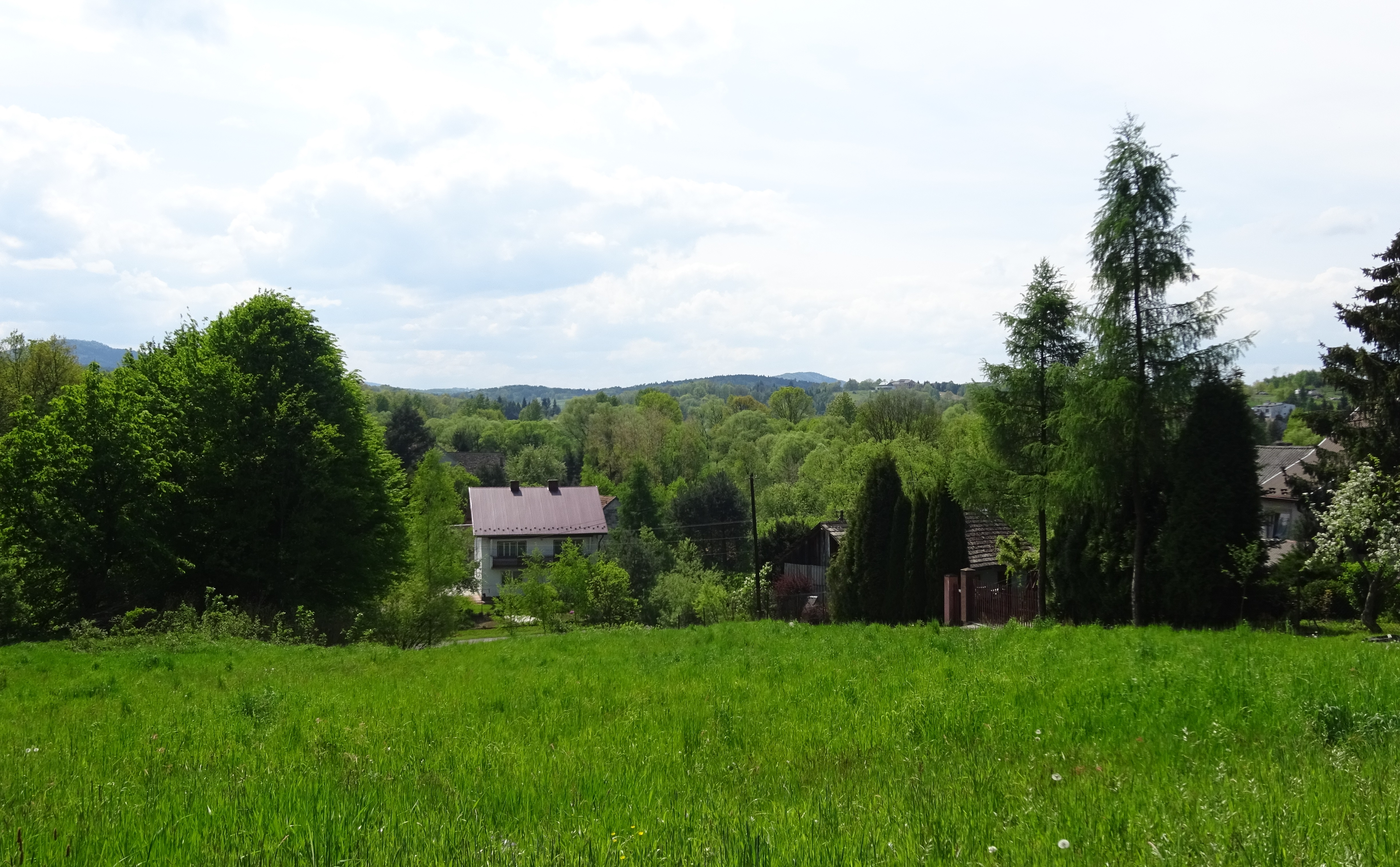 Fragment wsi Zarzyce Małe. Widok w stronę południową. 2016